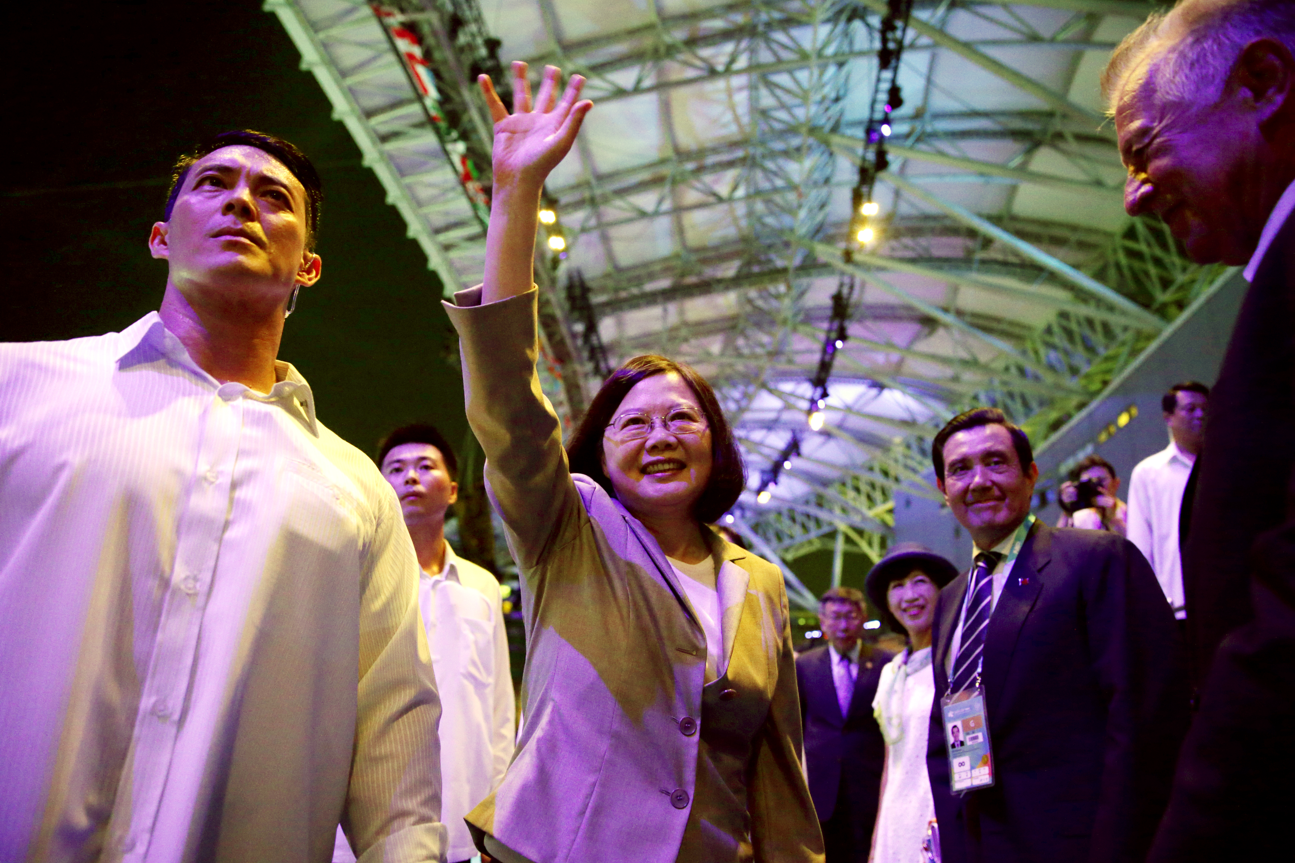 08.19 總統出席2017年世界大學運動會開幕典禮，並起立向所有選手代表們揮手致意